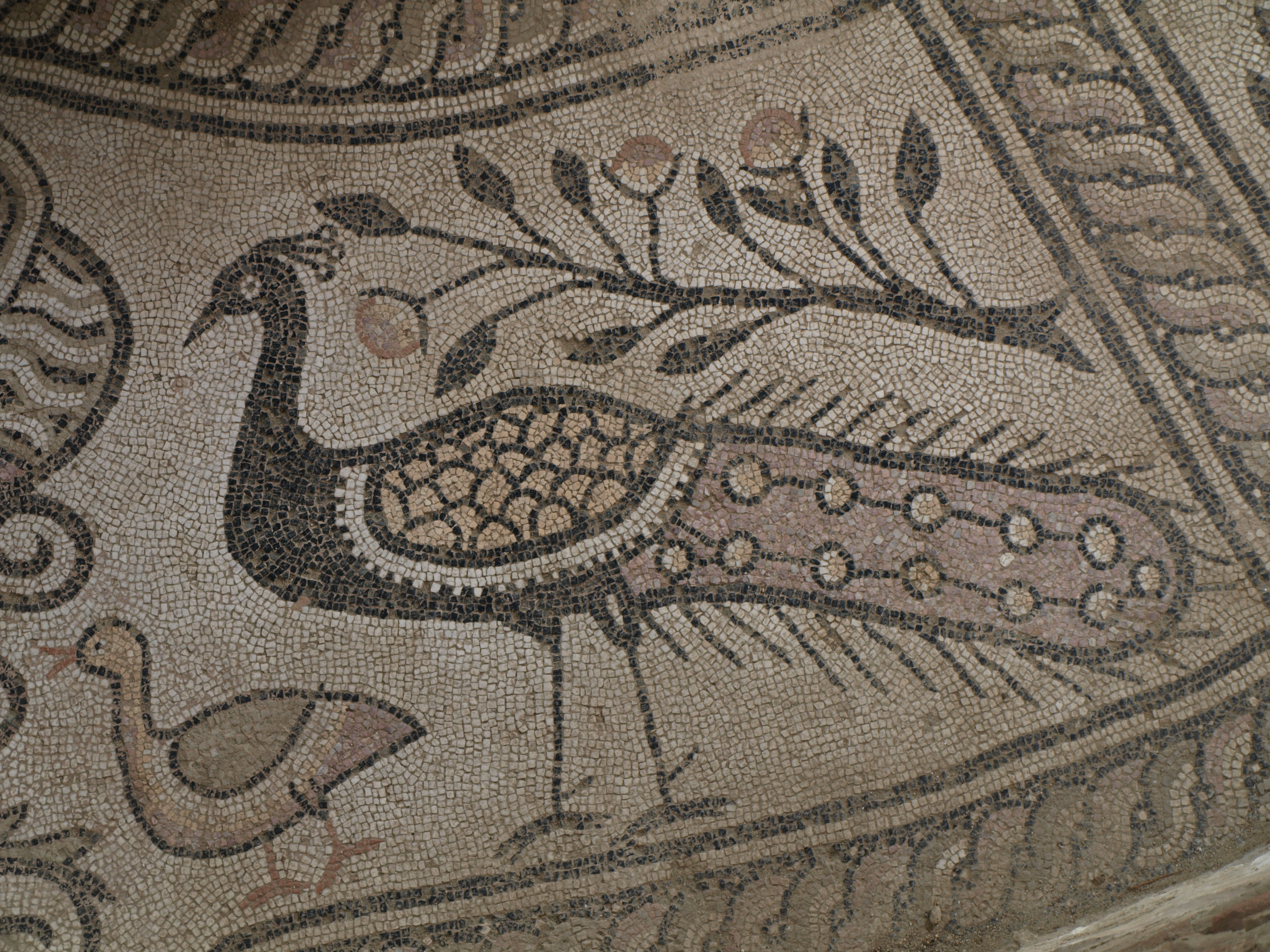 Fußbodenmosaik (Detail) im Baptisterium der Basilika in Stobi